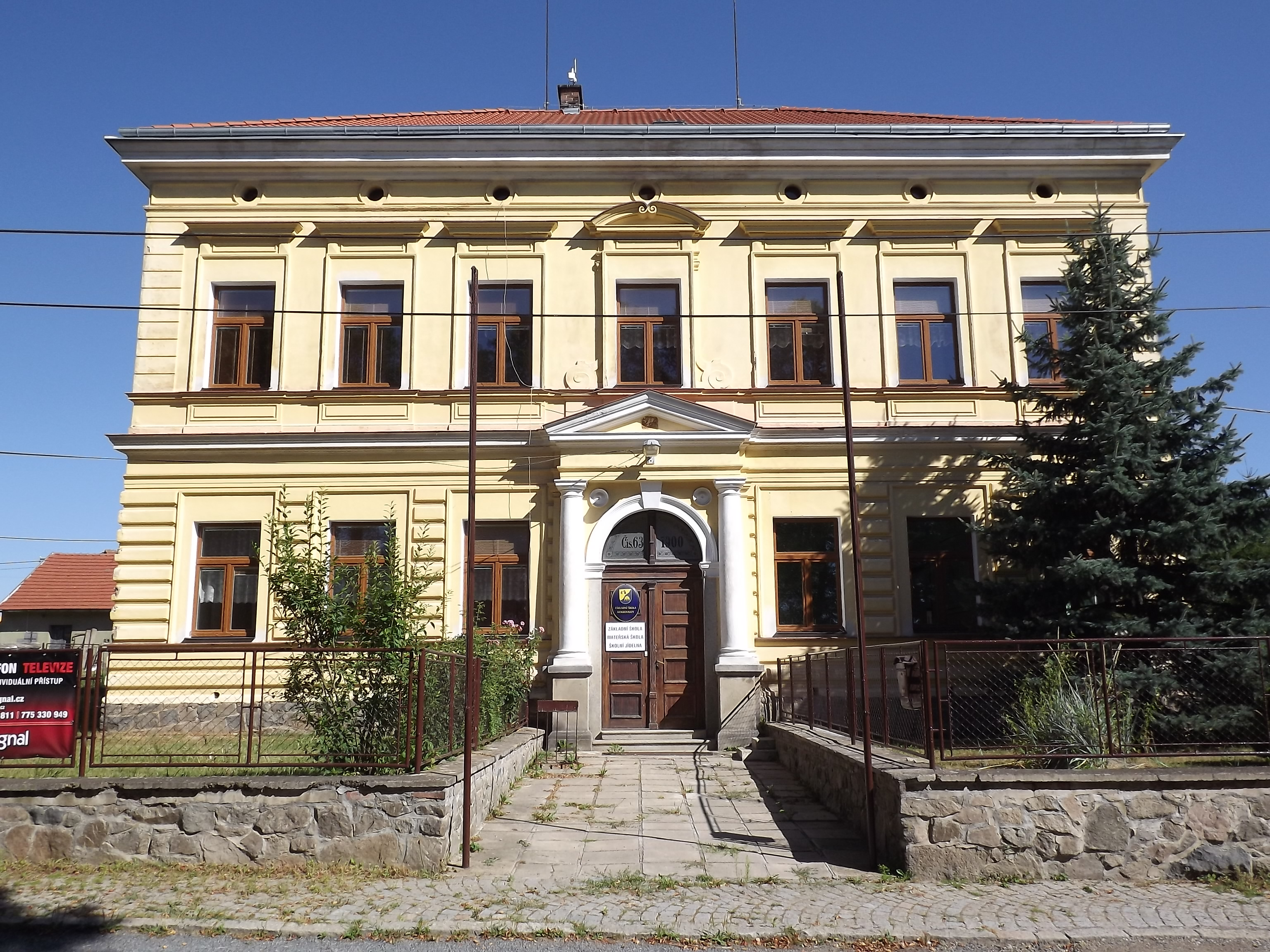 škola